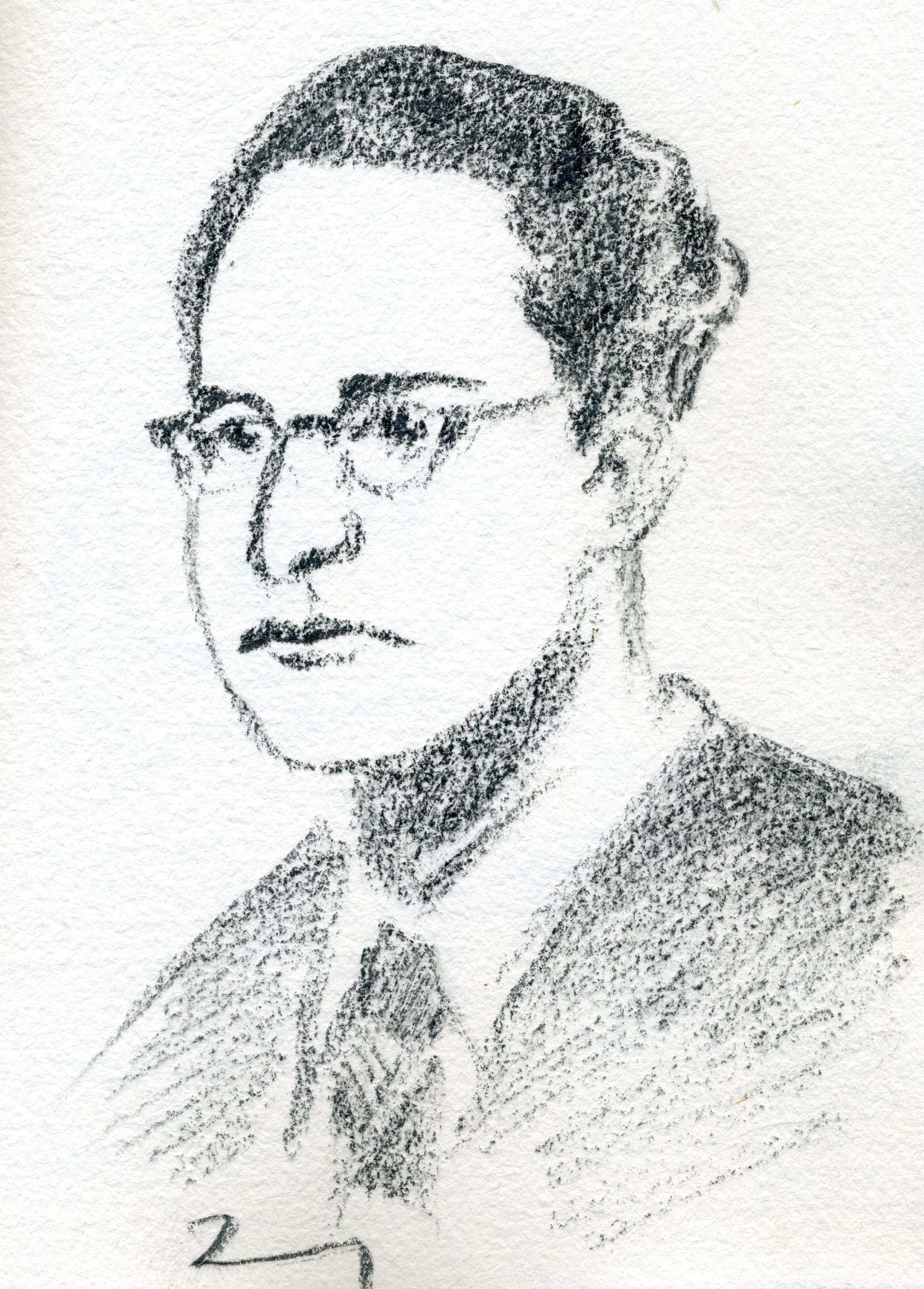 portrait de Jorge de Sena par Victor Couto